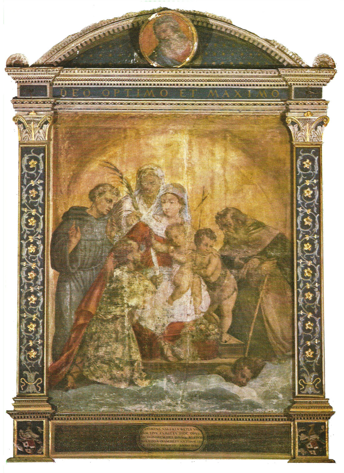 Opera di Antonio Badile conservata nella chiesa parroccciale di Mazzurega (Fumane - VR)